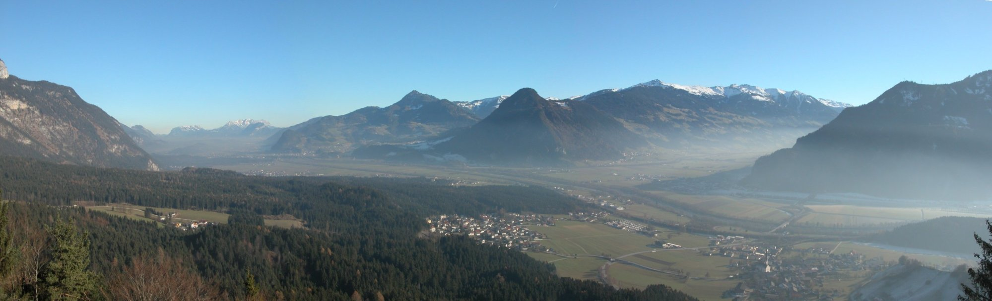 Blick auf das Inntal